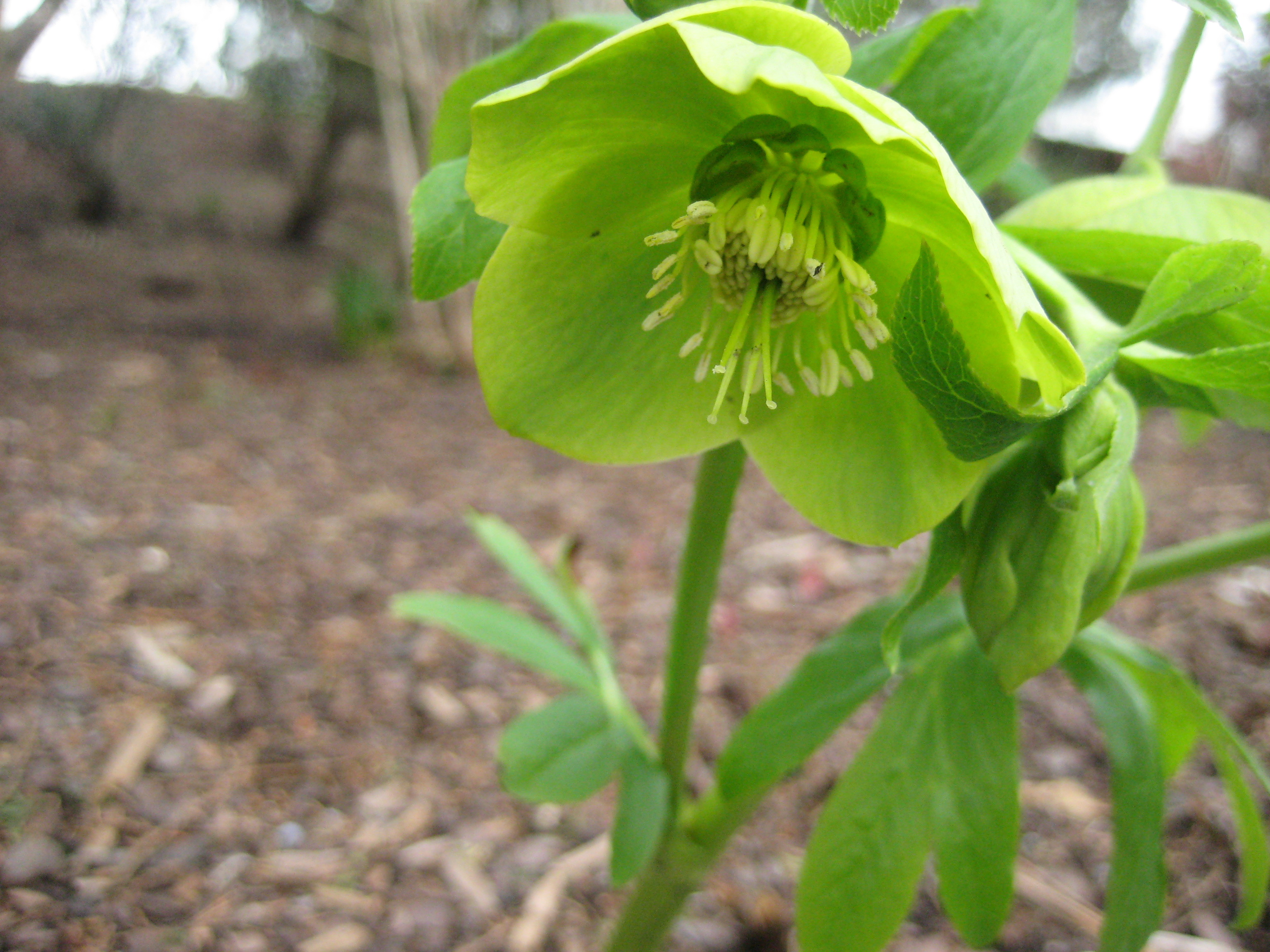 Helleborus odorus Ranunculaceae Yugoslavia to Romania, S. to Bulgaria